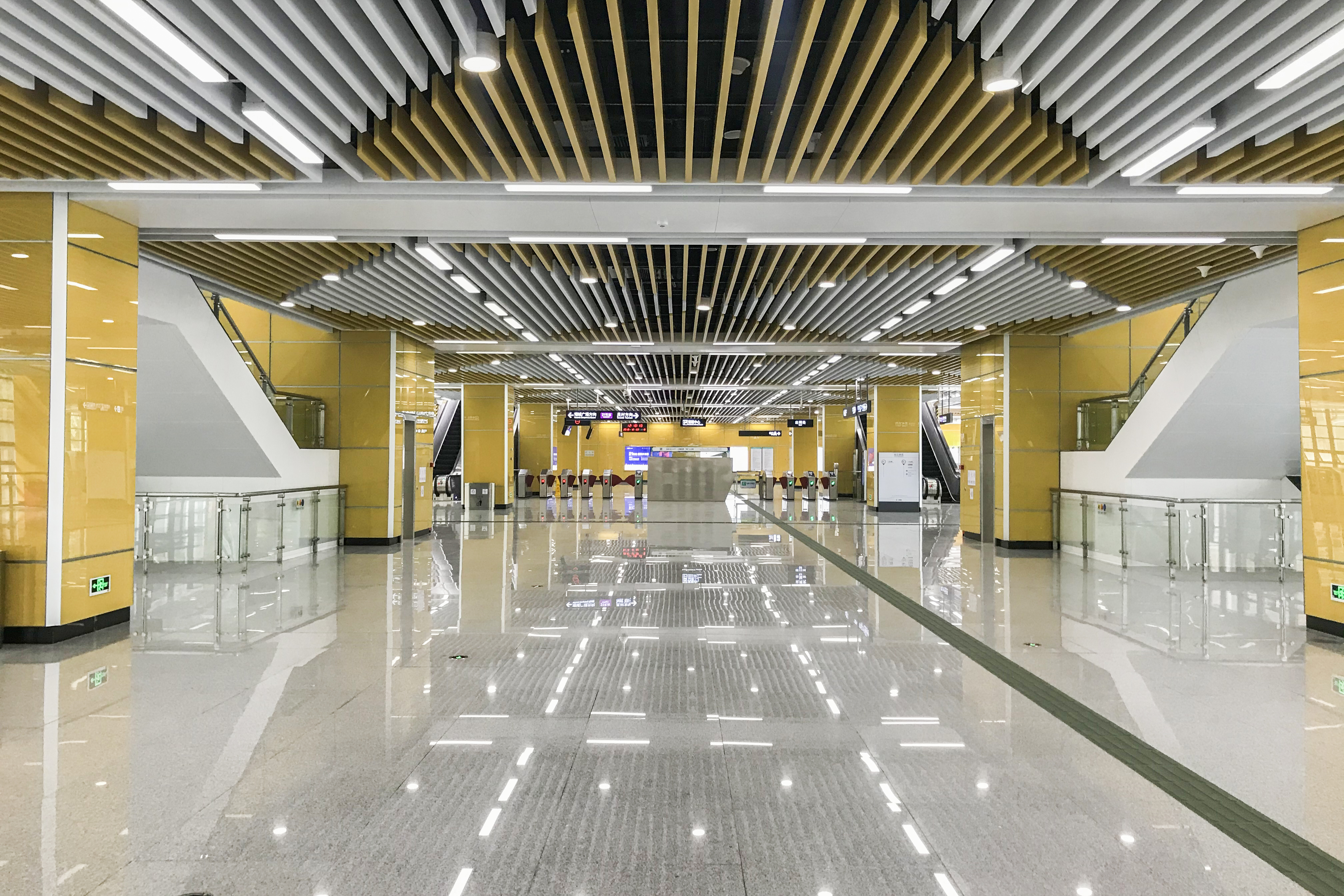 广州地铁金坑站